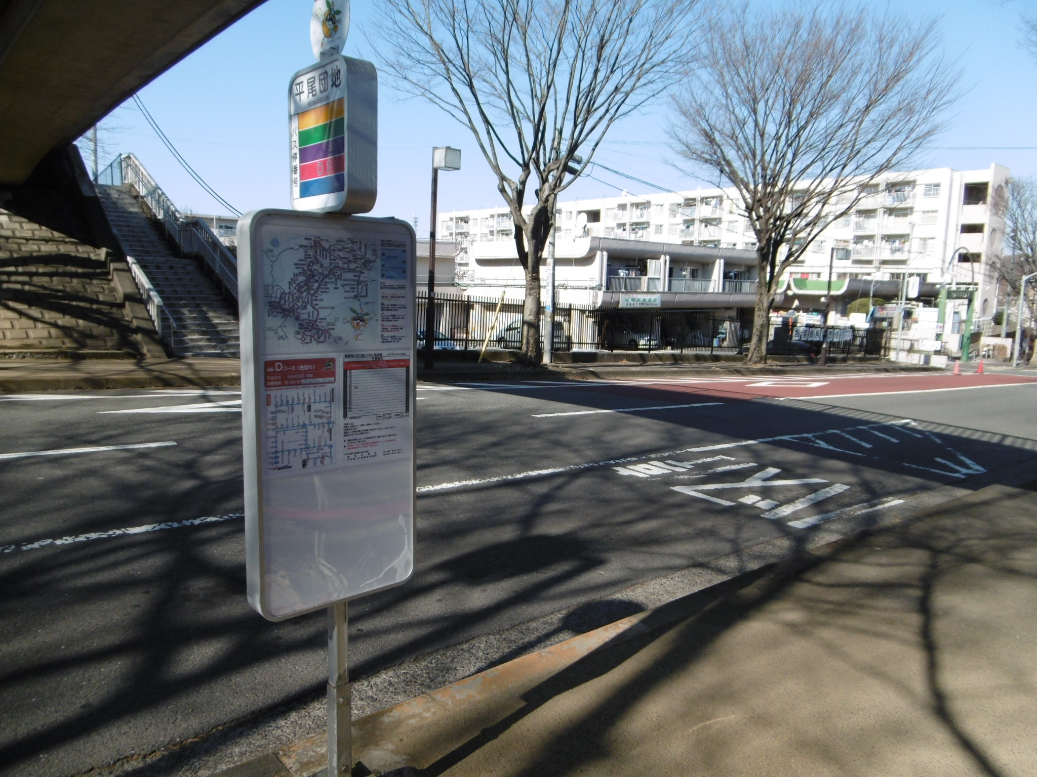 東京都稲城市にある稲城市コミュニティバスiバスの停留所である平尾団地前。